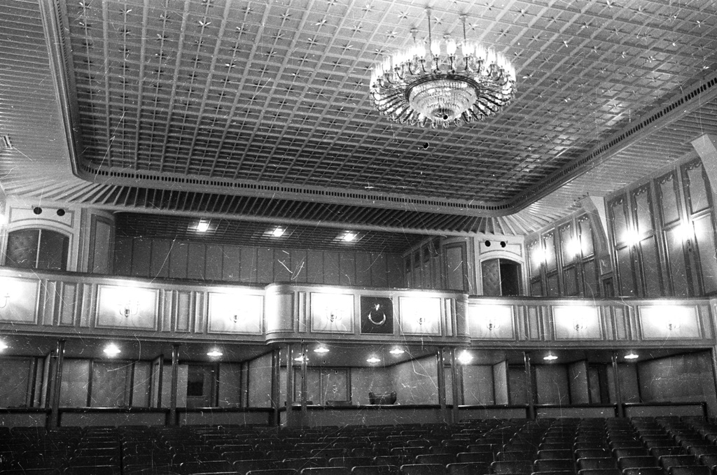 The Ankara Opera Building, which hosts performances by the Ankara State Opera and Ballet and Ankara State Theater was designed and built as an exhibition center and only later converted into an opera house. In 1933 the National Economy Community opened an international competition for the building stating that it had to be in modernist style. A proposal by Şevki Balmumcu received first prize and construction went ahead between 1933 and 1934. In 1948 Paul Bonatz converted the building into an opera house and his addition of traditional Turkish architectural details made it more “national.” Balmumcu was not consulted about the building’s renovation, which disappointed and professionally disturbed him for years to come. In the garden of the building there are sculptures of Leyla Gencer, Cüneyt Gencer and Muhsin Ertuğrul. SALT Research, Söylemezoğlu Archive Günümüzde hem Ankara Devlet Opera ve Balesi temsillerine ev sahipliği yapan hem de Büyük Tiyatro adıyla Ankara Devlet Tiyatrosu için bir sahne olarak hizmet veren Ankara Opera Binası, ilk olarak bir sergi sarayı olarak inşa edildi, daha sonra opera binasına dönüştürüldü. Binanın tasarımına, Milli İktisat ve Tasarruf Cemiyeti’nin 1933’te açtığı uluslararası bir yarışma sonunda karar verildi. Yarışmanın duyurusunda, tasarımın modernist üslupta olması gerektiği özellikle belirtildi. Birinci seçilerek mimarı Şevki Balmumcu’ya büyük bir prestij kazandıran proje 1933-1934 yıllarında uygulandı. Paul Bonatz, 1948’te binayı işlevinden çok farklı olarak bir opera binasına çevirdi; Geleneksel Türk Mimarlığı’ndan detaylar ekleyerek binayı “millîleştirdi”. Tasarladığı binanın kendisine hiç danışılmadan, dönemin eğilimi olan İkinci Ulusal Mimarlık’a uygun hâle getirilmesi, Balmumcu’yu mesleki anlamda olumsuz etkiledi. Caddeye paralel uzanan ve birbirini dik kesen iki kitleden oluşan binanın bahçesinde Leyla Gencer, Cüneyt Gencer ve Muhsin Ertuğrul’un heykelleri bulunmaktadır. SALT Araştırma, Söylemezoğlu Arşivi